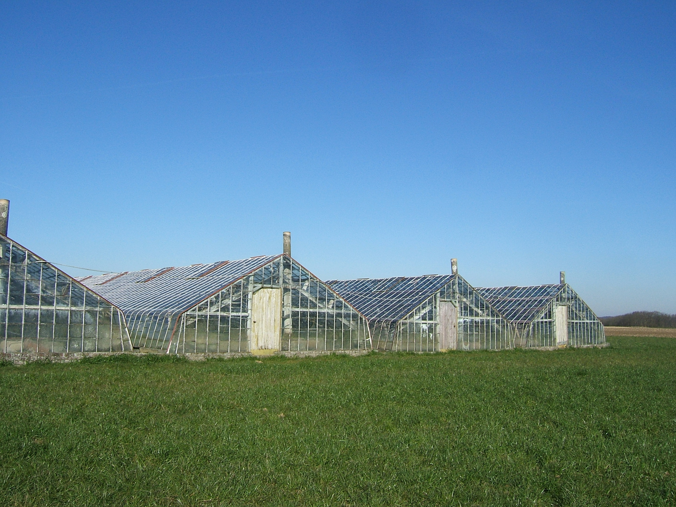 Greenhouses for Grapes; Brabant, België.